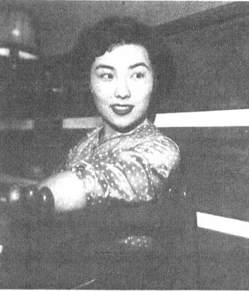 読売新聞社『家庭よみうり』387号（1954年）より生田恵子